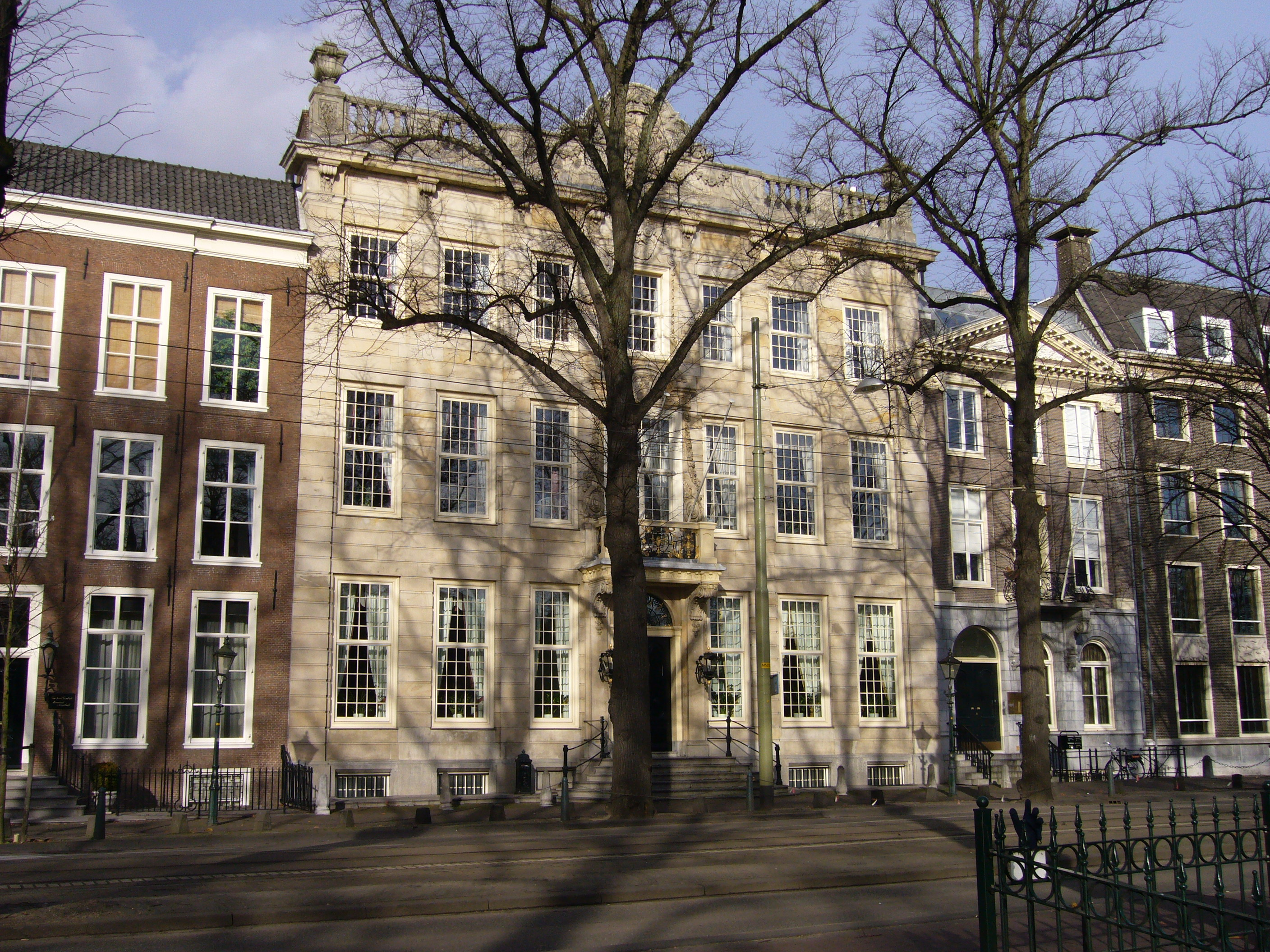 Den Haag, Duitse ambassade